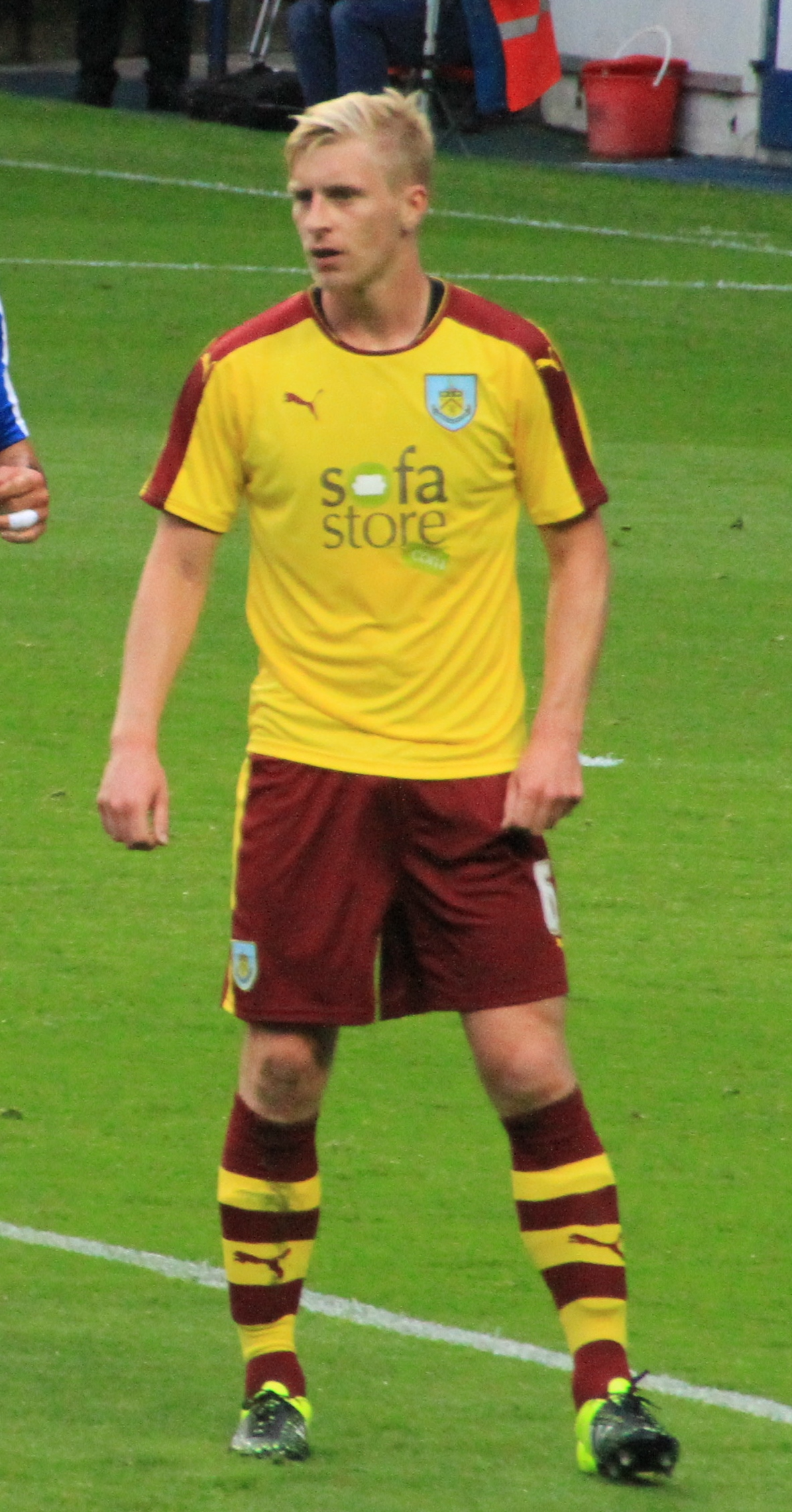 Martyn Waghorn.